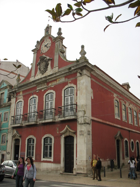 Caldas da Rainha (Portugal), antiga Casa da Câmara/ former Town Hall